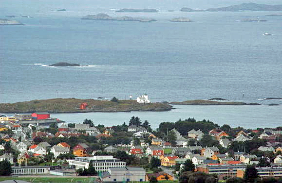 Utsikt mot Tonjer fyr og Røvær i vest